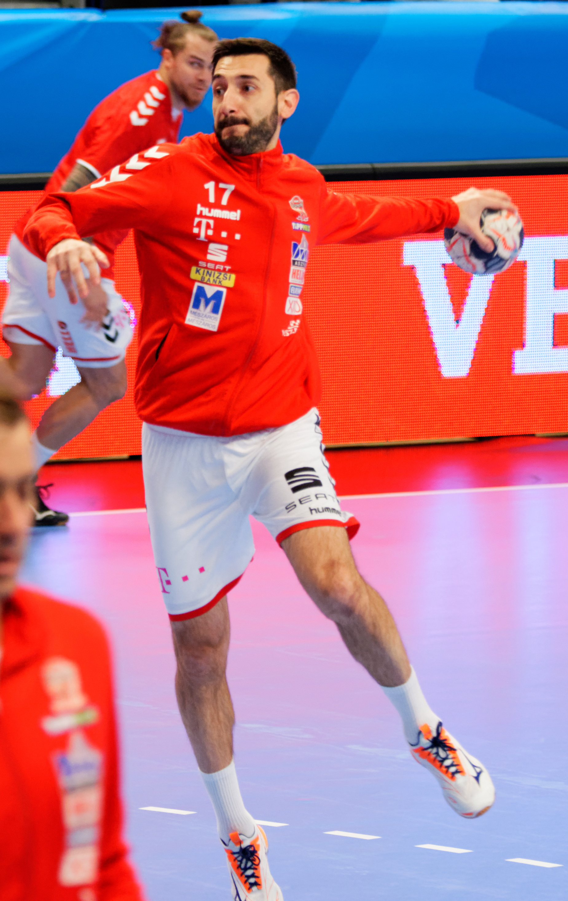 Rencontre de phase de groupe de la ligue des champions 2017/18 entre le PSG et Veszprem. A Coubertin, le 12 novembre 2017.